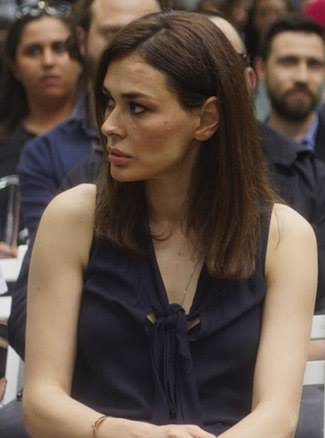 Ayşe Hatun, Can Bonomo ve Demir Demirkan, 12. Radyo Boğaziçi Müzik Ödülleri'nde.